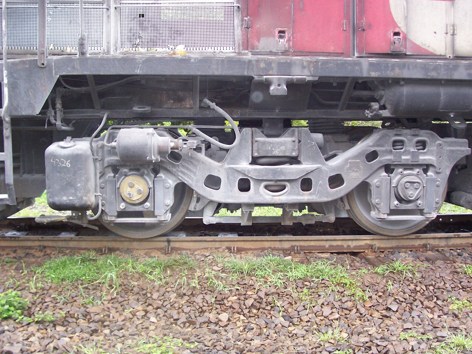 Truque Flexicoil de bitola de 1.000mm